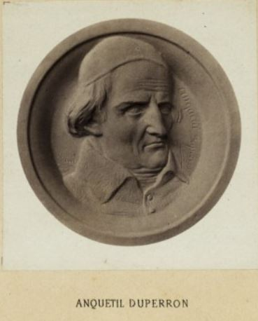 Abraham Hyacinthe Anquetil-Duperron (1731-1805), linguiste, médaillon par David d'Angers, Pierre-Jean (1788-1856) in Les médaillons de David d'Angers réunis et publiés par son fils David d'Angers, Robert (1833-1912). 1867